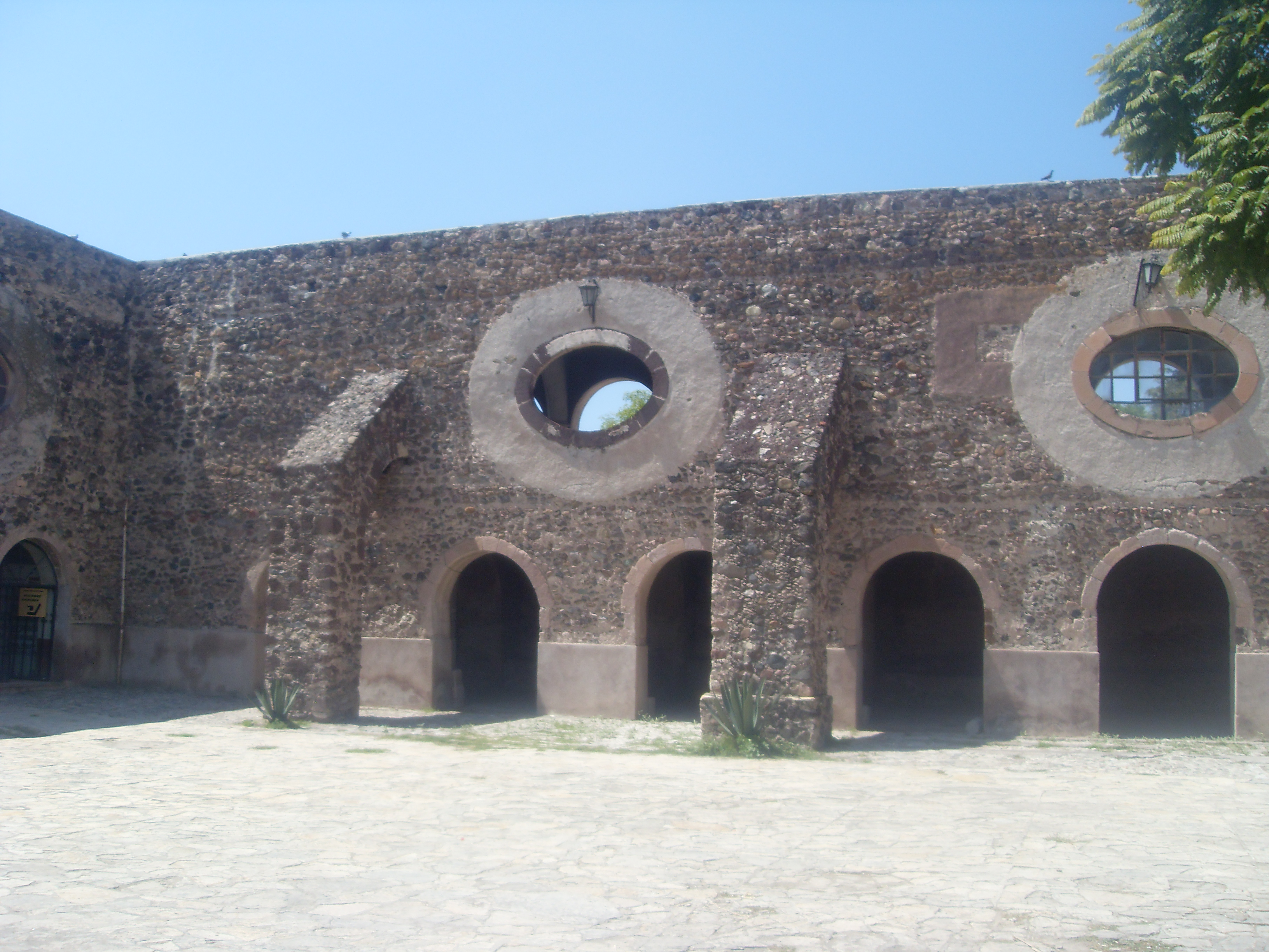 Caballerizas del ex convento de San Nicolas de Tolentino en Actopan, hidalgo, México.